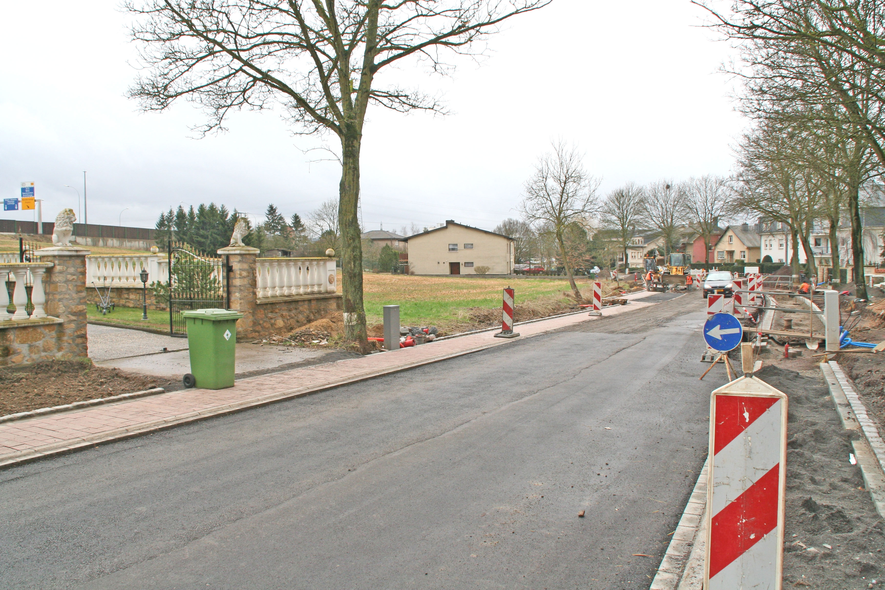 Féiz, rue Théodore de Wacquant